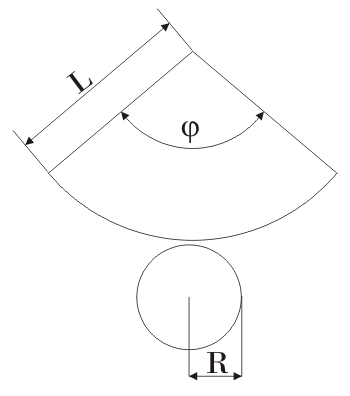 Развертка прямого конуса